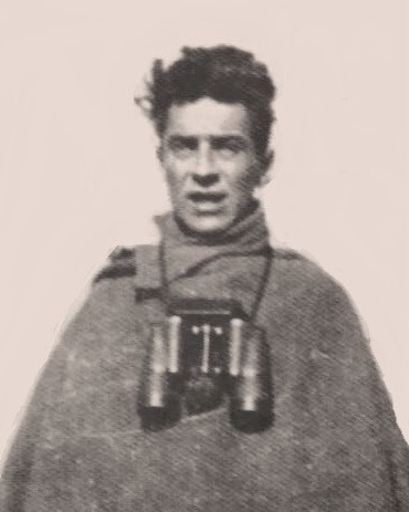 Luchino Dal Verme (1913 - 2017), comandante partigiano